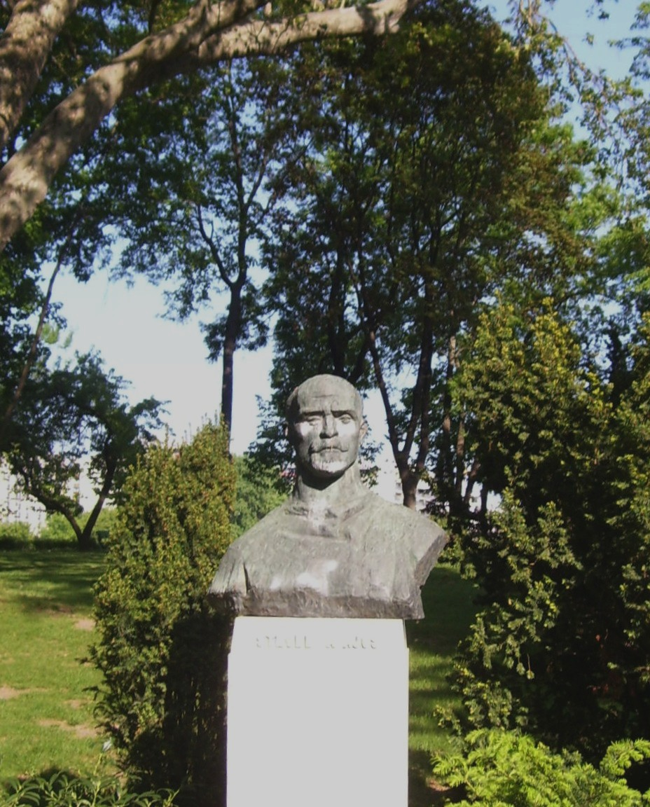 Stróbl Alajos mellszobor Margítsziget. Segesdi György alkotása (1958)